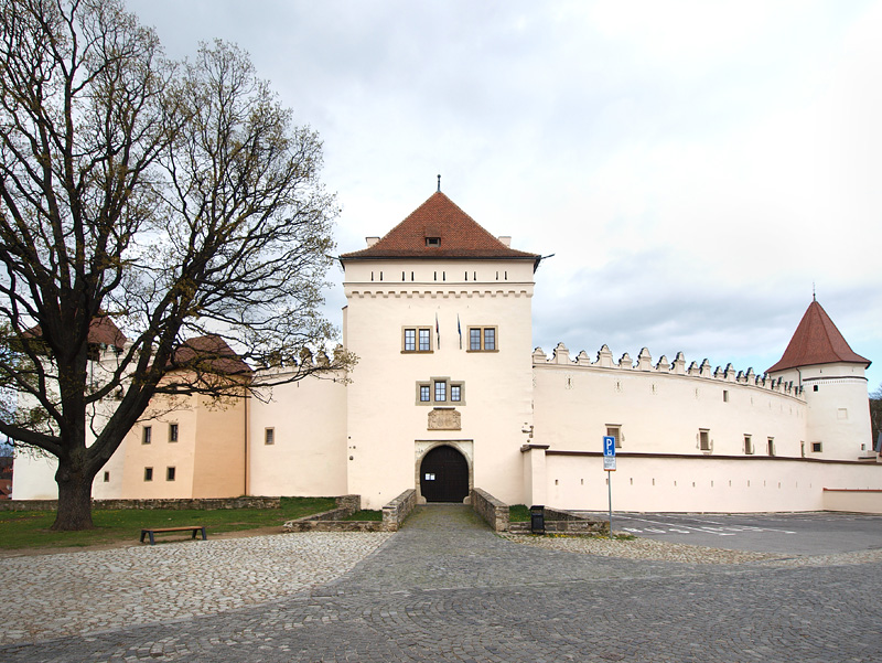 Kežmarok - Kežmarský hrad